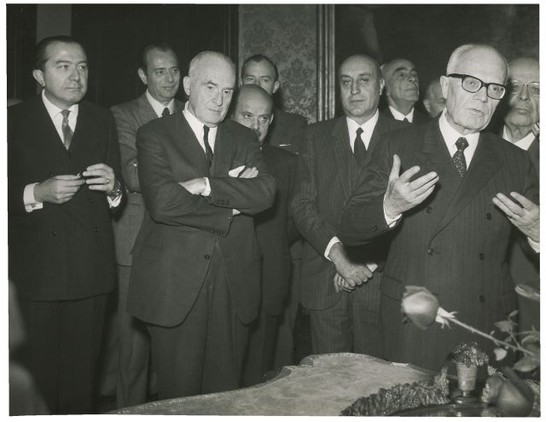 Il vice presidente della camera Roberto Lucifredi con Giulio Andreotti e Sandro Pertini in occasione degli auguri alla stampa parlamentare per le festività 1970.